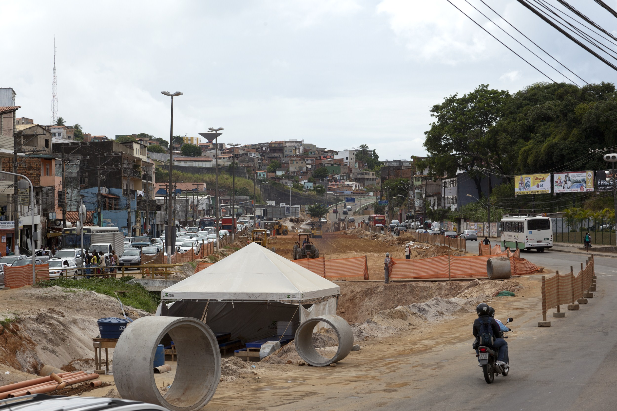 Obras de drenagem na Avenida Vasco da Gama, em Salvador.